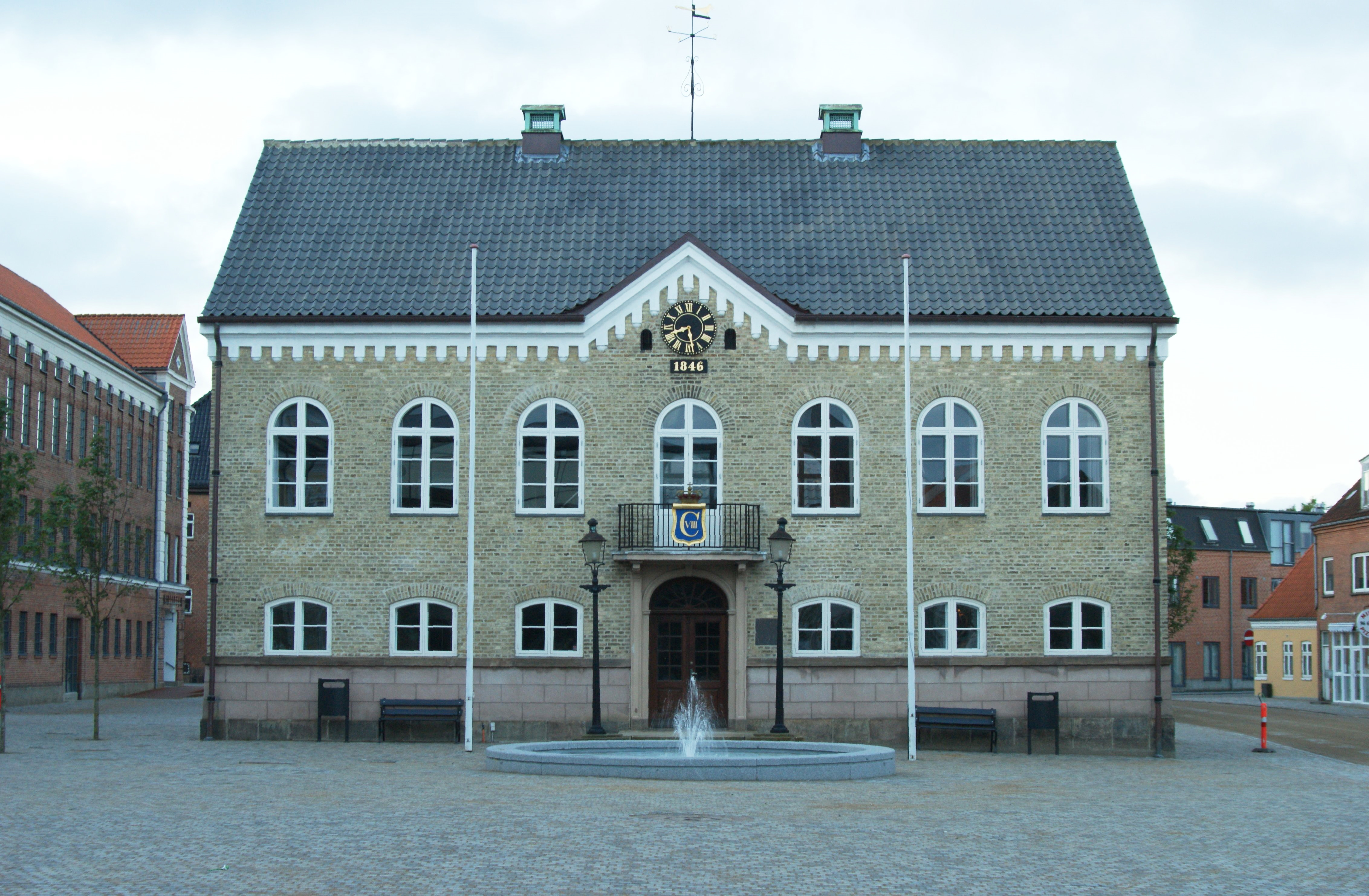 Nykøbing Mors gamle rådhus på Rådhustorvet 1K, opført 1846-47, fredet 1977, afløst af det nye rådhus på Jernbanegade 7 i 1980.